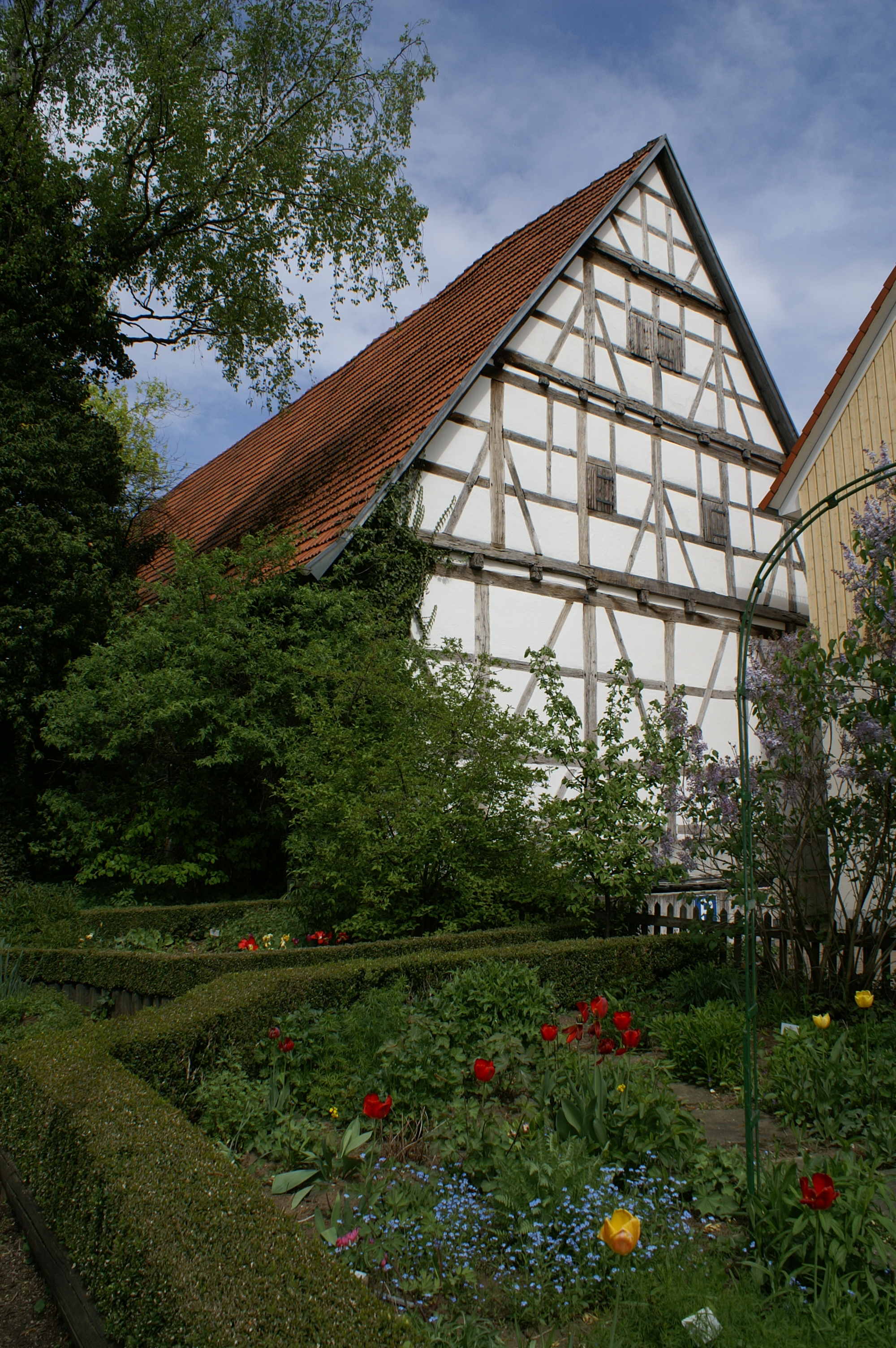 Der Bauerngarten der Stadt Süßen wird von den Landfrauen betreut.